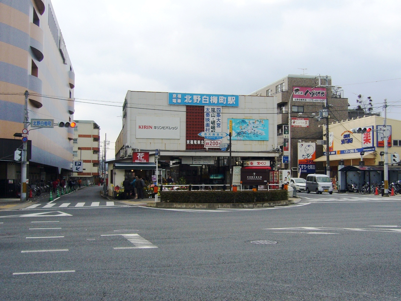 京福電気鉄道北野線北野白梅町駅の駅舎周辺。駅に行くためには必ず信号つきの横断歩道を渡る必要があることがわかる。 2009年1月23日に投稿者が撮影。